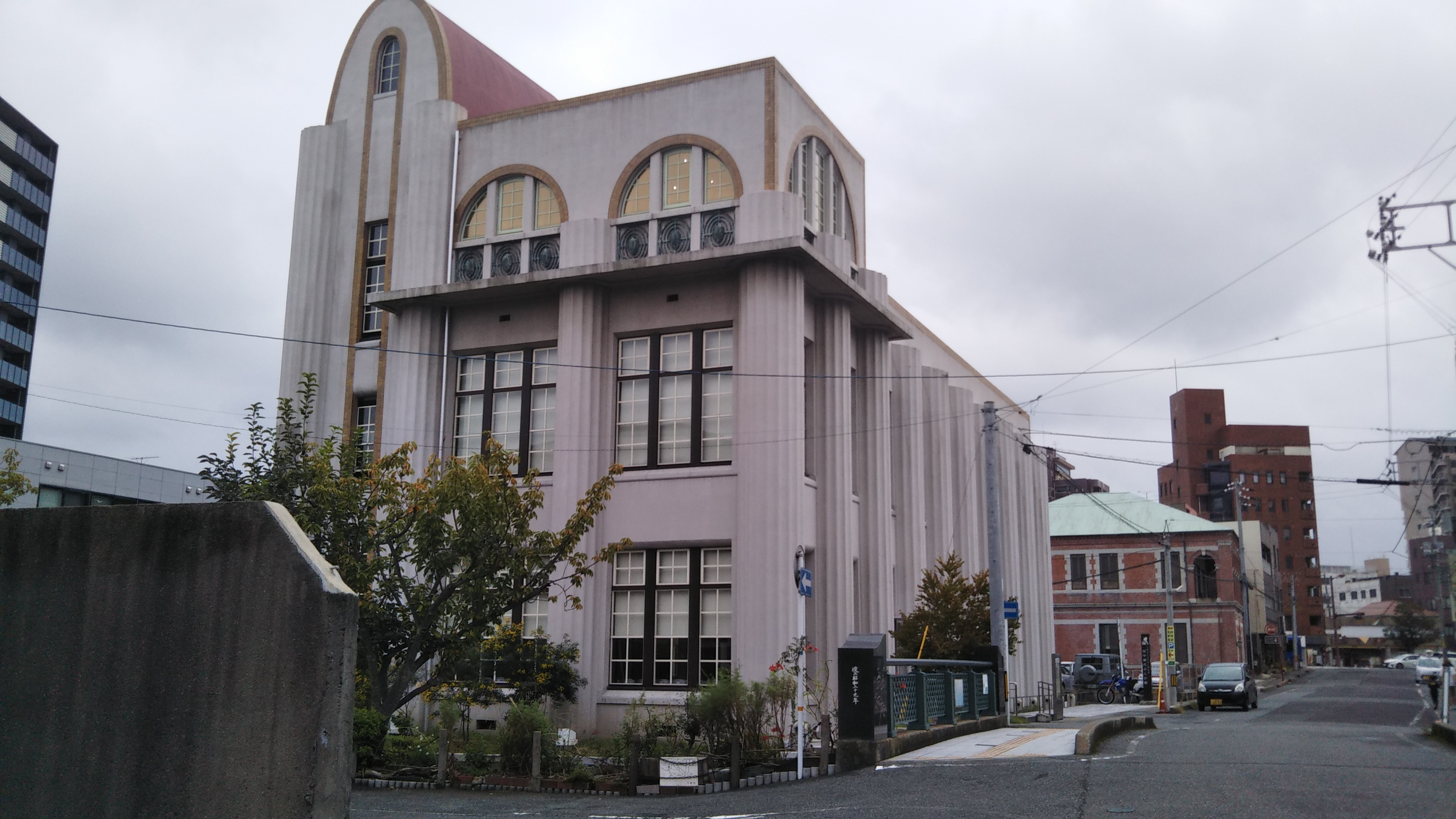 下関市田中町にある田中絹代ぶんか館。2019年9月28日に田中町で撮影。